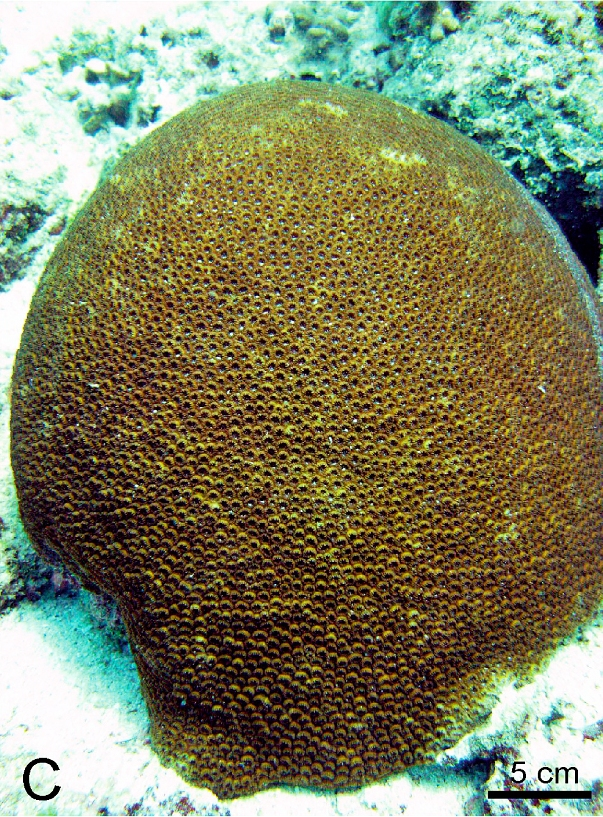 Astrea devantieri (sinonimia Plesiastrea devantieri)- 10 m profundidad, isla Socotra. Benzoni et al. (2011) Phylogeny of the coral genus Plesiastrea (Cnidaria, Scleractinia). Contributions to Zoology, 80 (4). Disponible en línea en